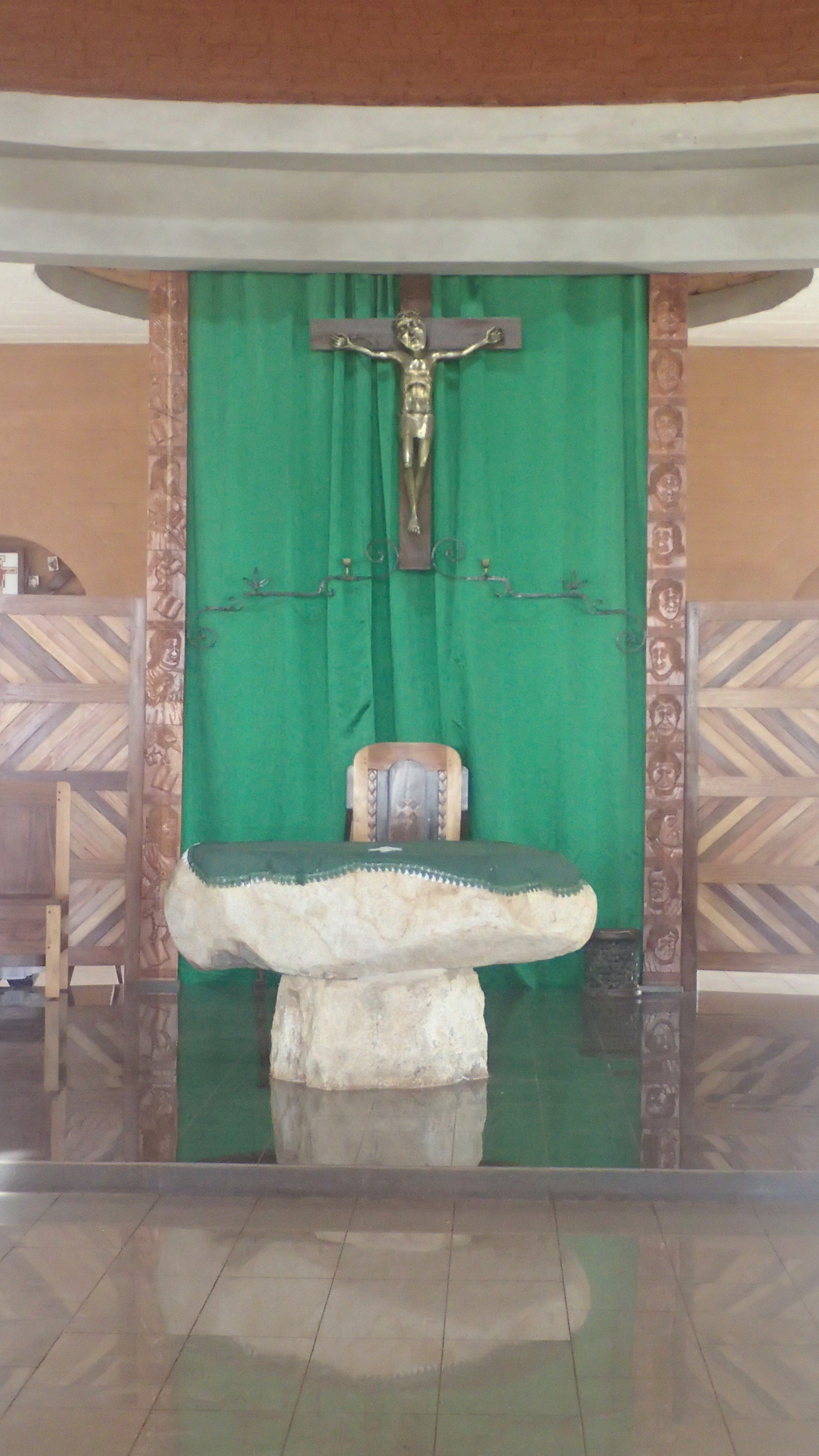 Abbaye de Koutaba - L'autel de léglise